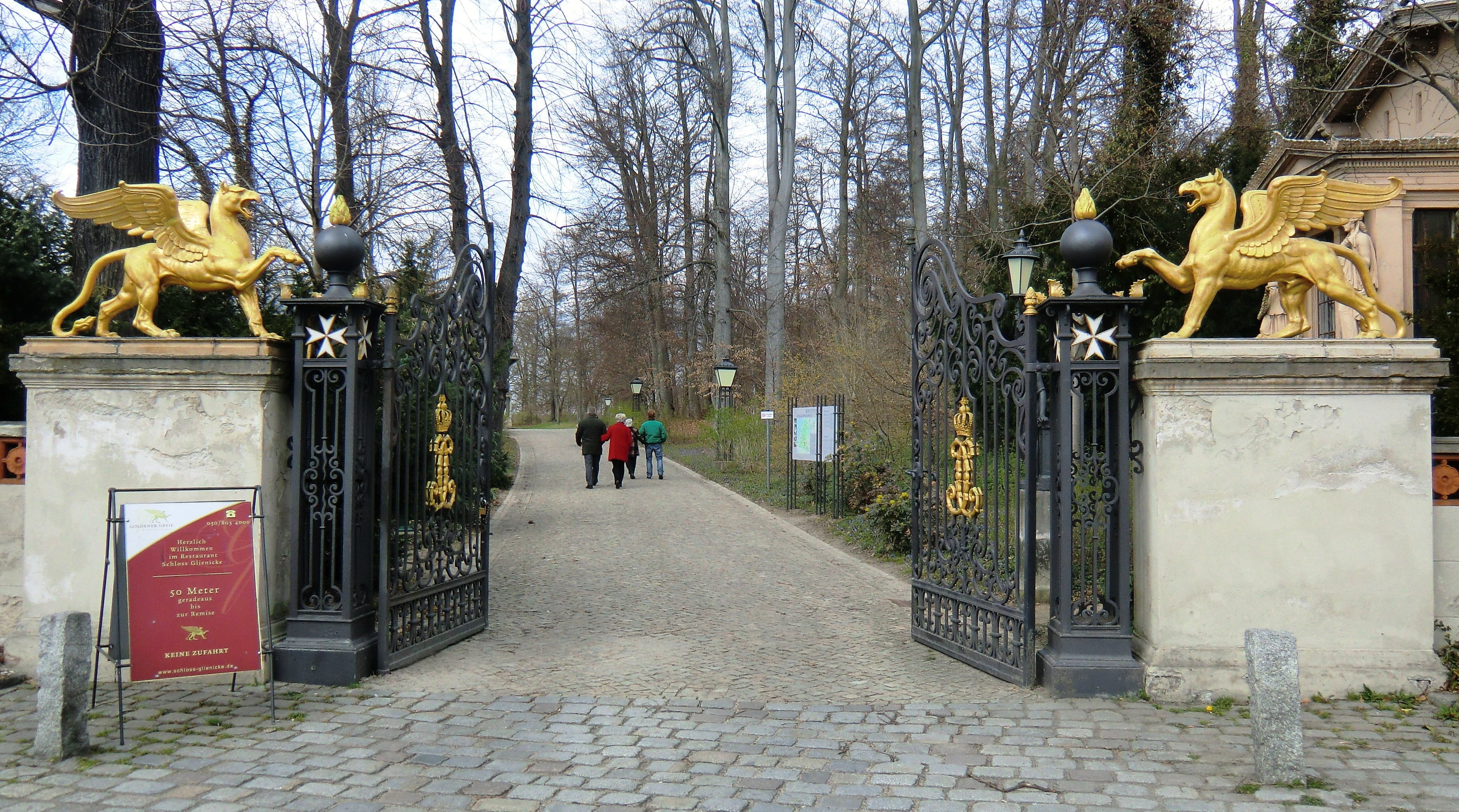 Haupteingang zum Park des Schlosses Glienicke an der Königsstraße.